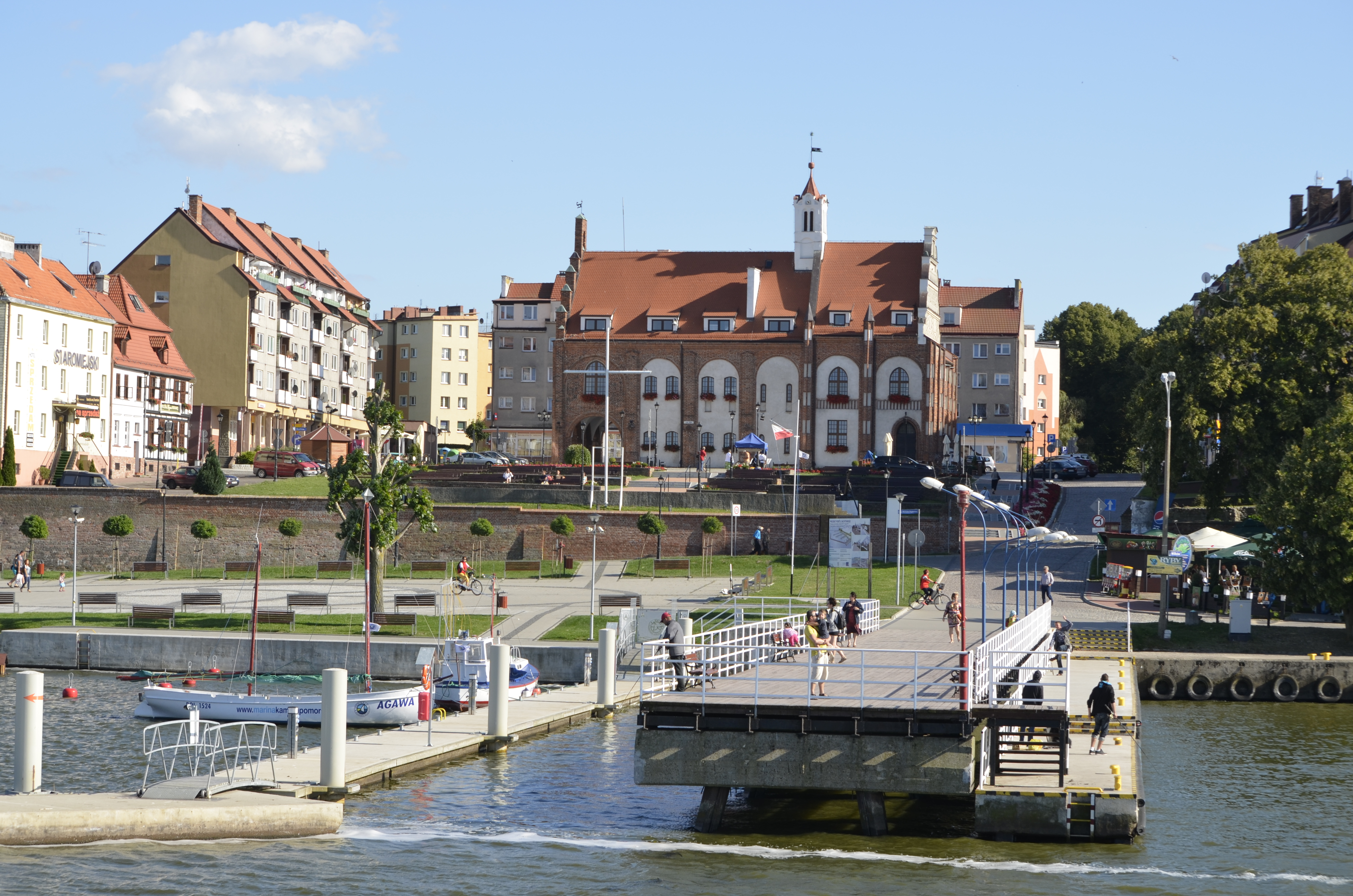 Kamień Pomorski, ratusz, XIV